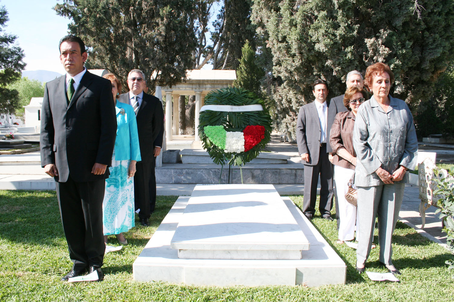 El Gobernador Humberto Moreira Valdés, los Titulares de los Poderes Legislativo y Judicial del Estado, los Alcaldes de Saltillo y Ramos Arizpe el Comandante de la 6ª Zona Militar, integrantes del Colegio Coahuilense de Investigaciones Históricas, así como los hijos, nietos y bisnietos del General Gutiérrez entre otros, montaron guardia de honor ante su tumba en la ciudad de Saltillo.